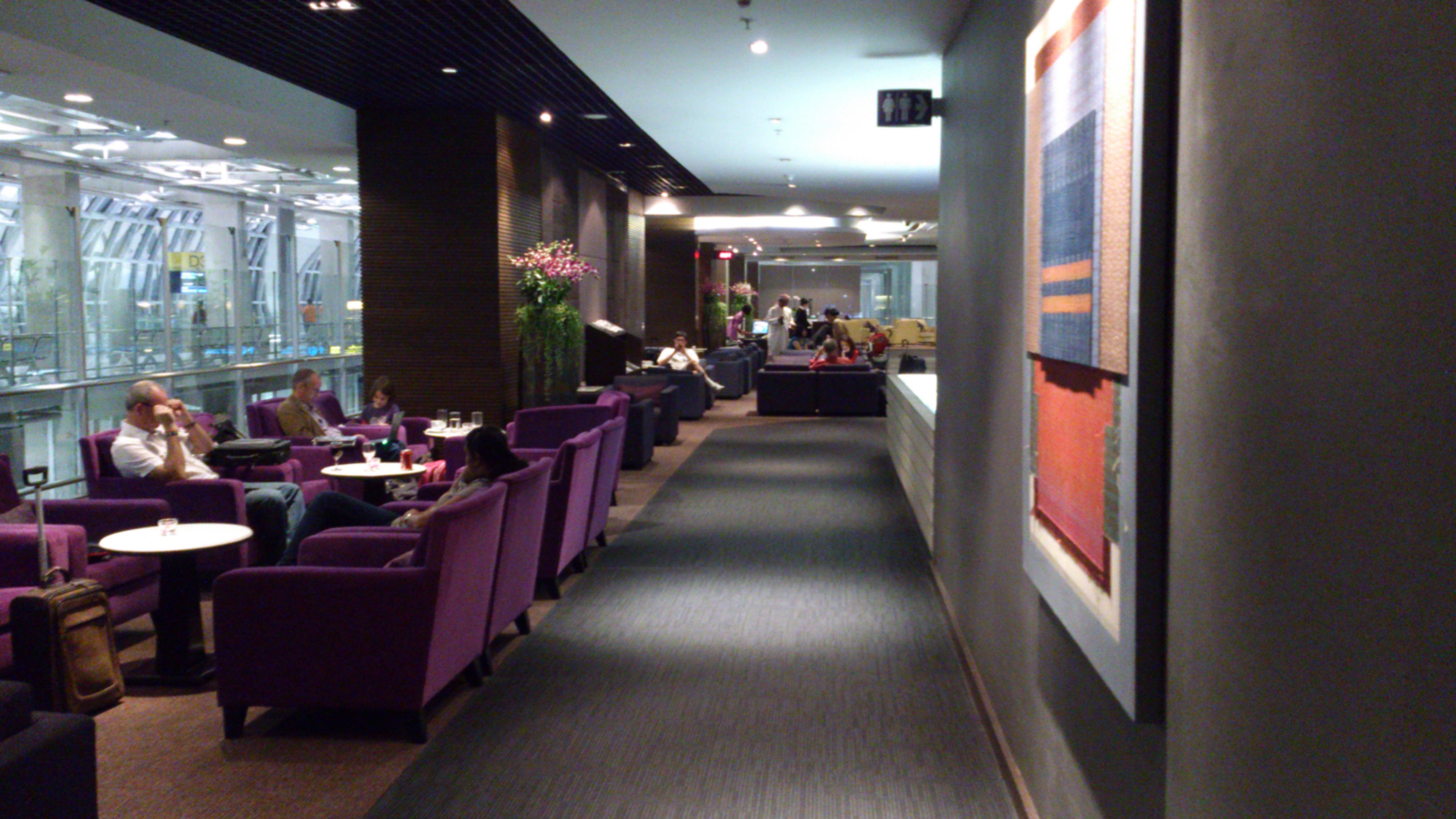 スワンナプーム国際空港のロイヤル・オーキッド・ラウンジ